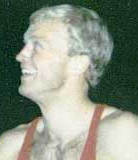 Dick Railsback and Hans Lagerqvist in Stockholm